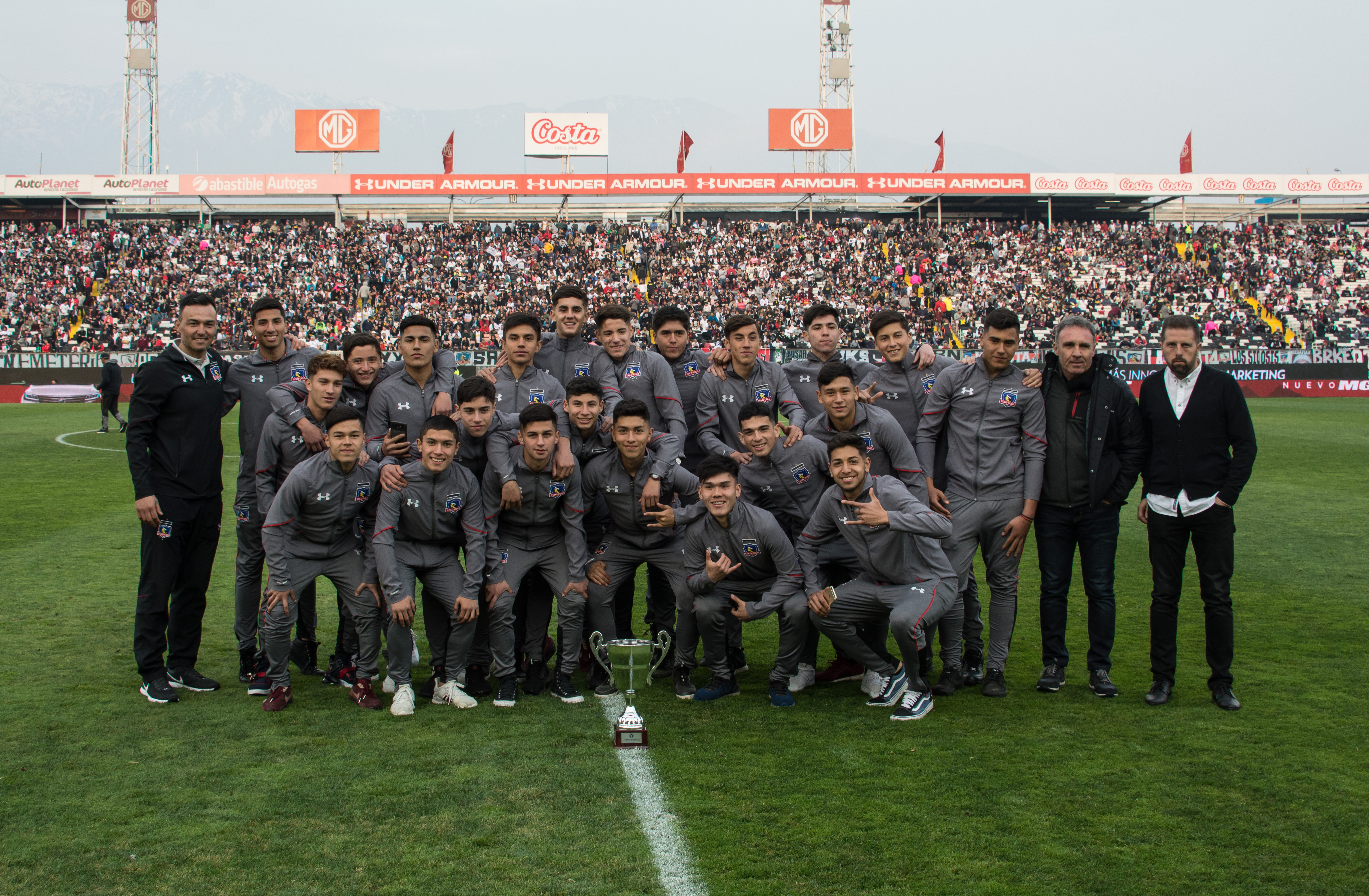 Colo-Colo Sub 16, Colo-Colo v San Luis, Estadio Monumental, Macul, Santiago, Chile.